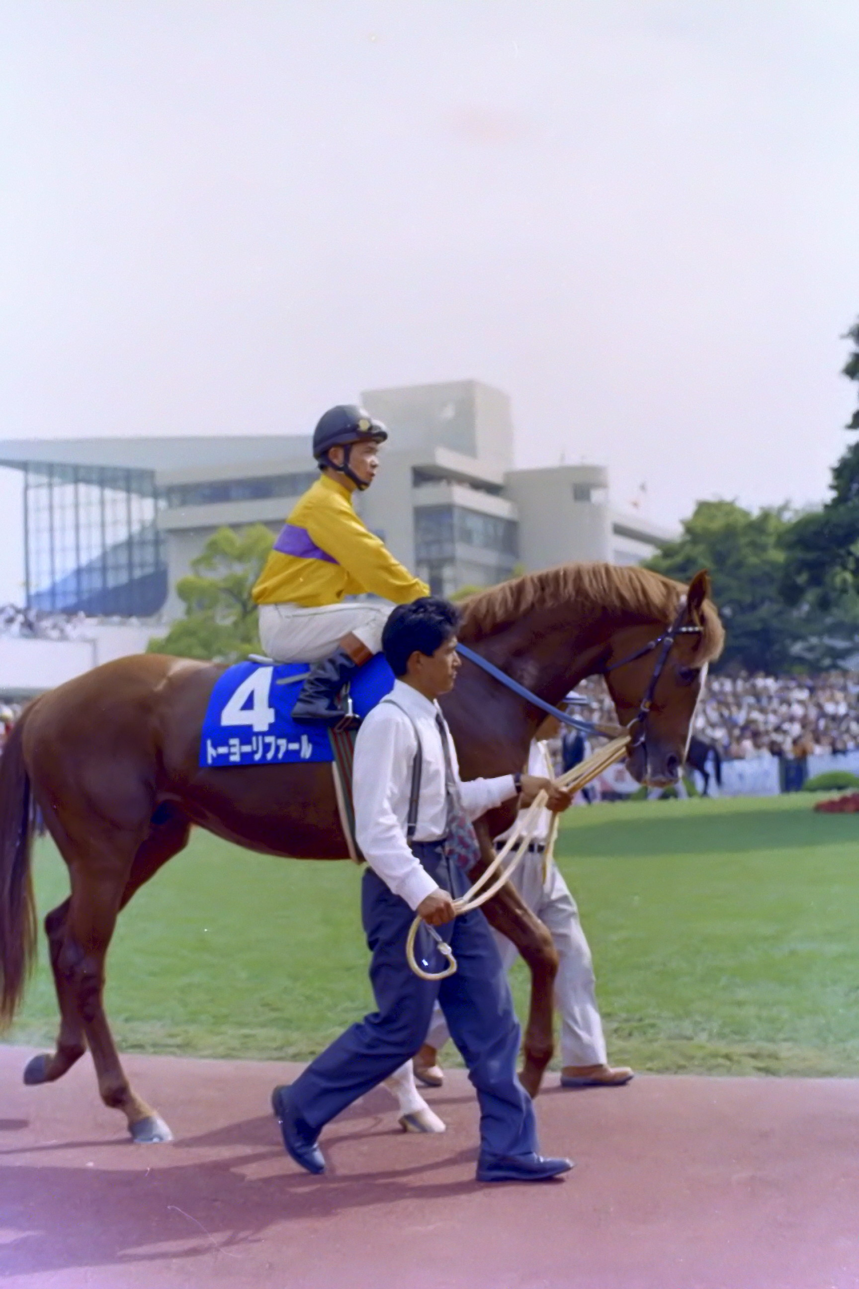 トーヨーリファール 1995年6月4日 京都競馬場